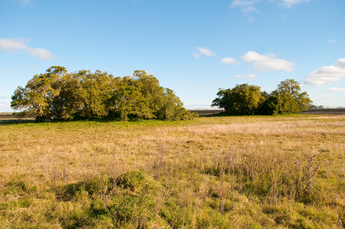 Conjuntos de Cerritos del área de India Muerta. Ubicada en el departamento de Rocha